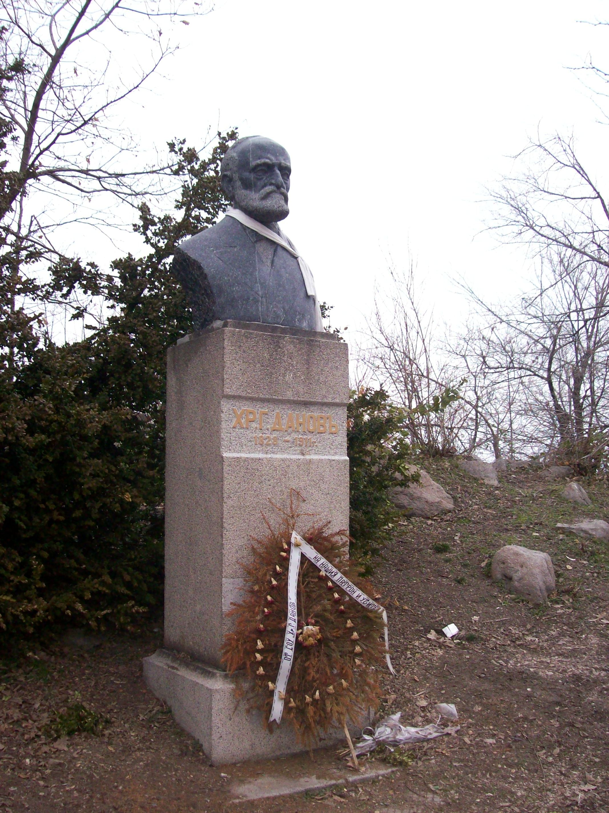 Паметник на Христо Г. Данов на Сахат тепе в Пловдив.